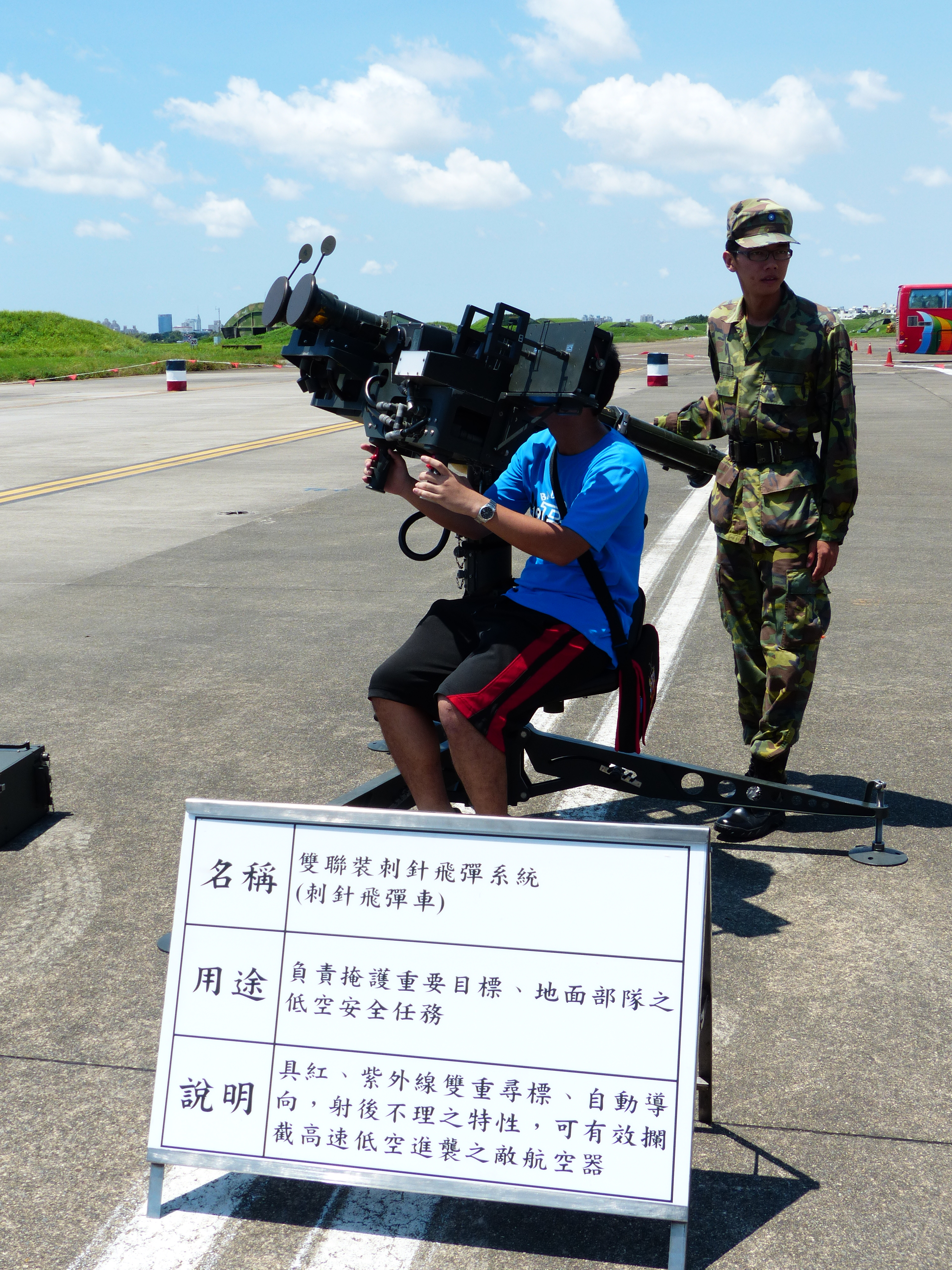 2013年臺南空軍基地營區開放活動，少年由陸軍士兵指導，體驗操作雙聯裝刺針飛彈發射器。